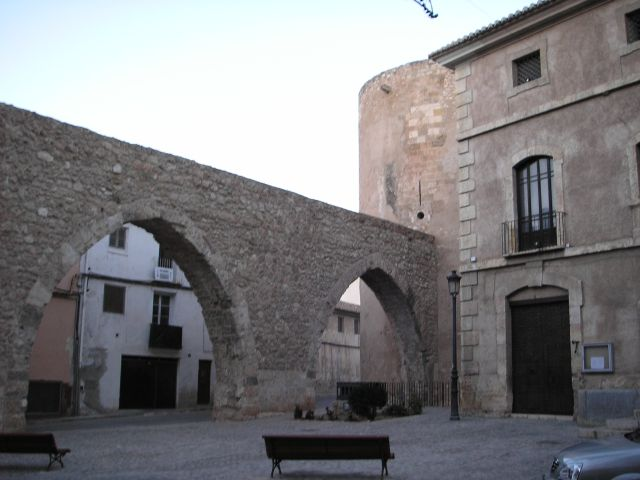 Vista del acueducto medieval, la torre del Botxí y el museo municipal de Segorbe